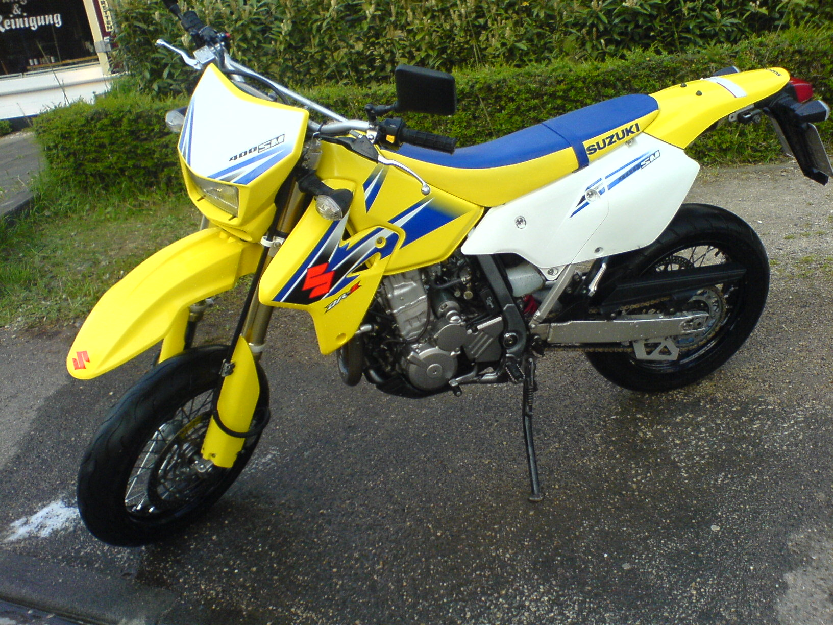 Suzuki DR-Z 400 SM Model 2006 (Supermotovariante der DR-Z in Originalzustand - linke Seitenansicht)